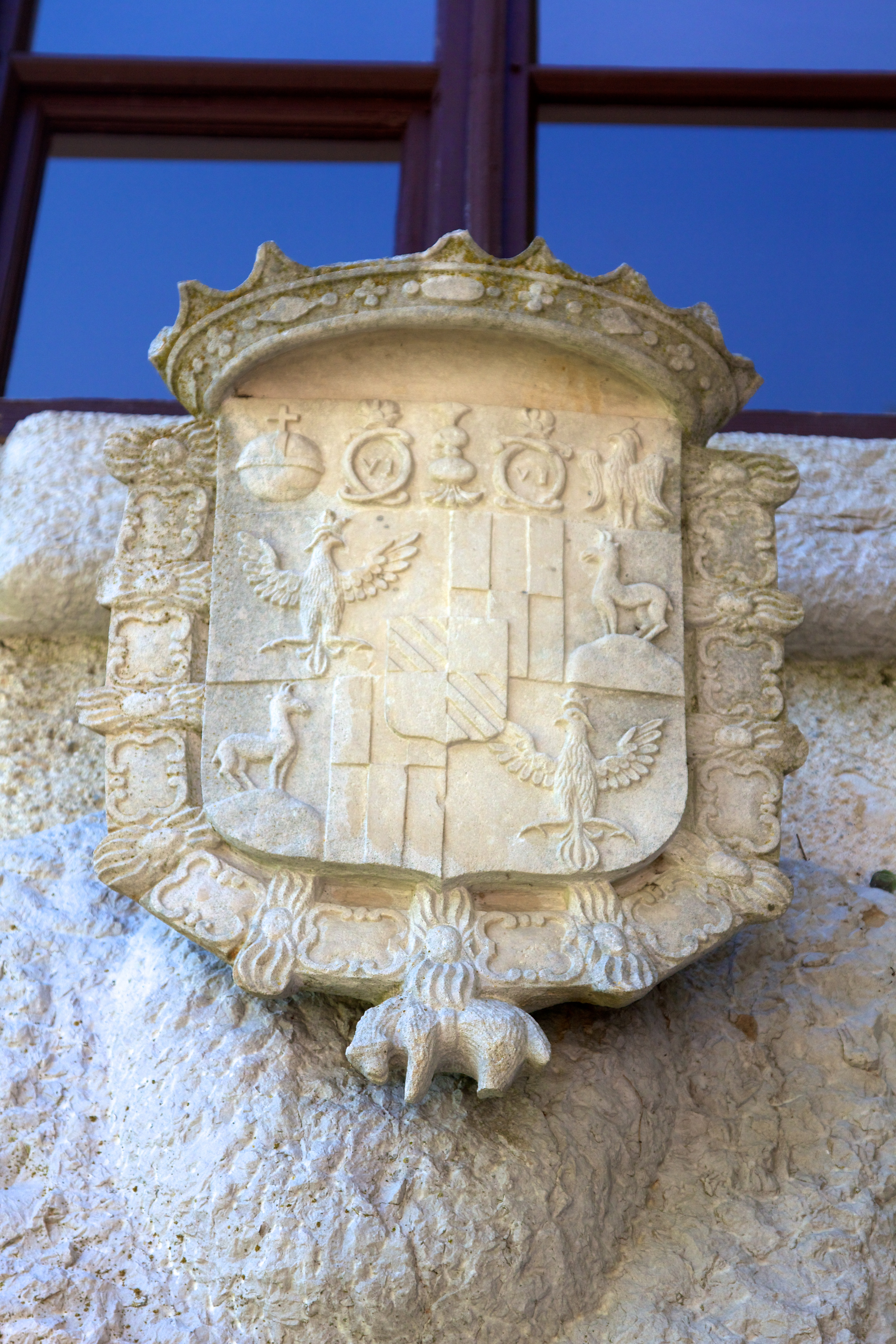 Grad Predjama, Predjama Castle